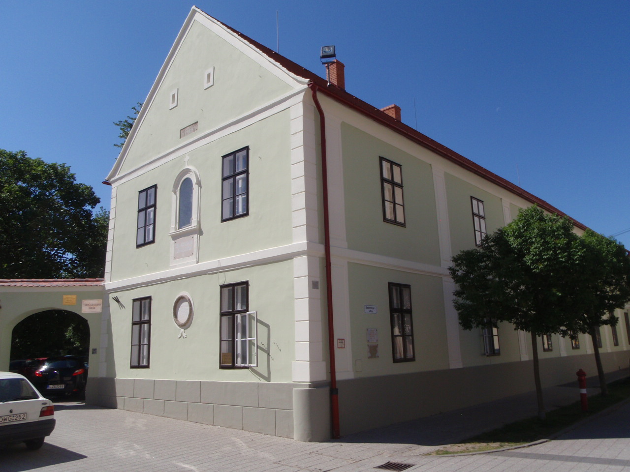 Sárvár Kinizsi utcában lévő egykori iskola, óvoda, ma orvosi rendelő. itt tanított Gárdonyi Géza